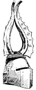 Иллюстрация из "Энциклопедии оружия" Вендалена Бехайма.